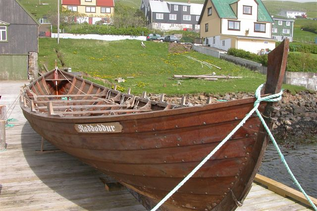 Færøbåden Naddoddur, Tvøroyri